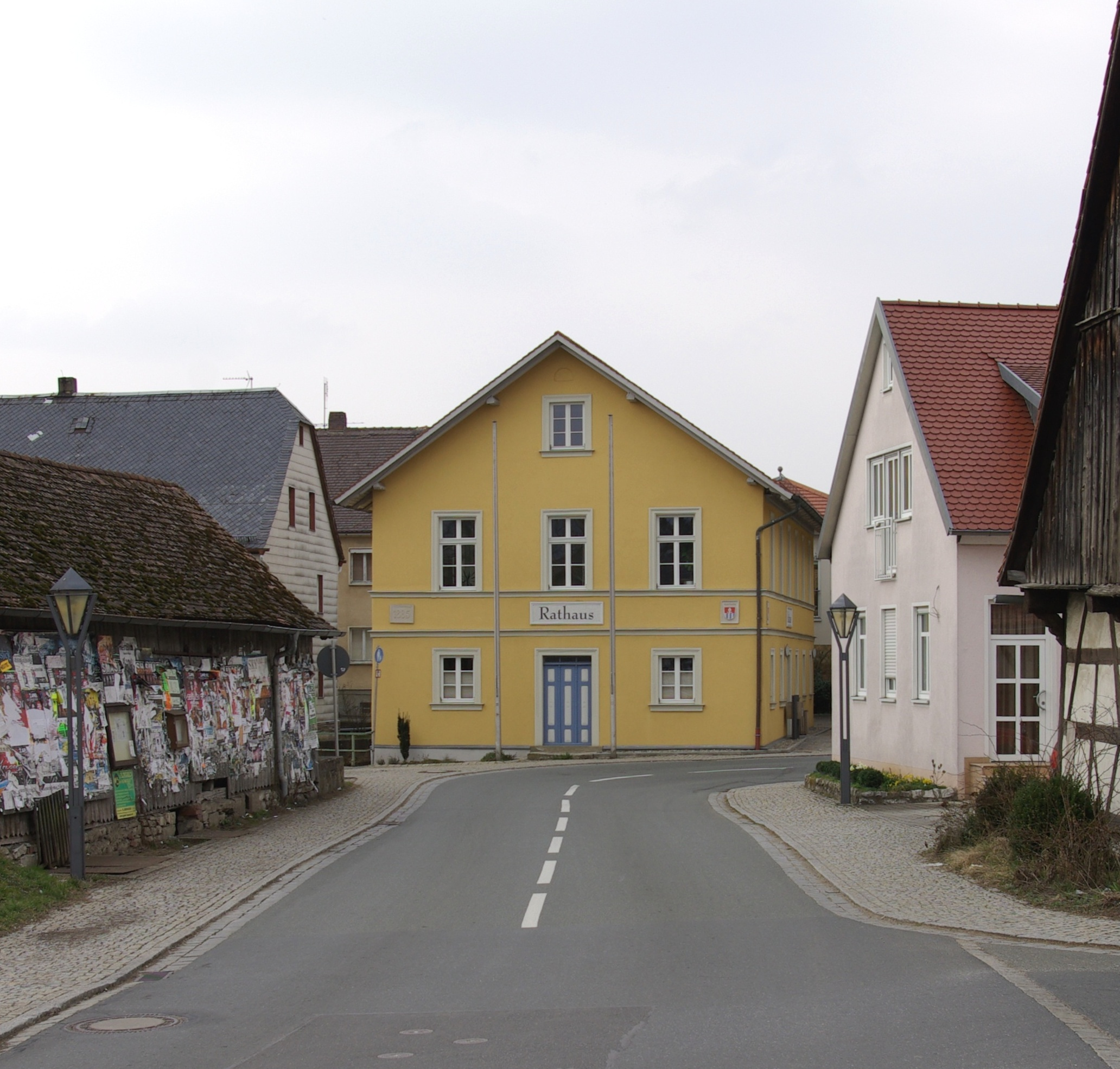 Rathaus in Pretzfeld